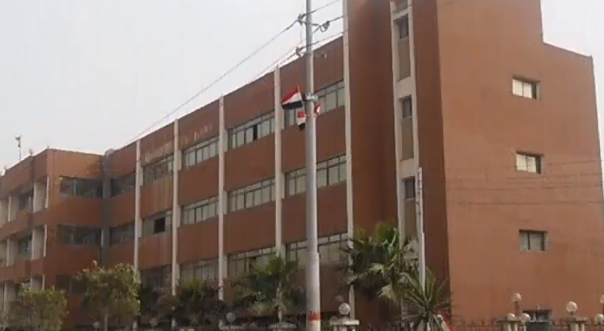 واجهة المستشفى الأمامية الرئيسية